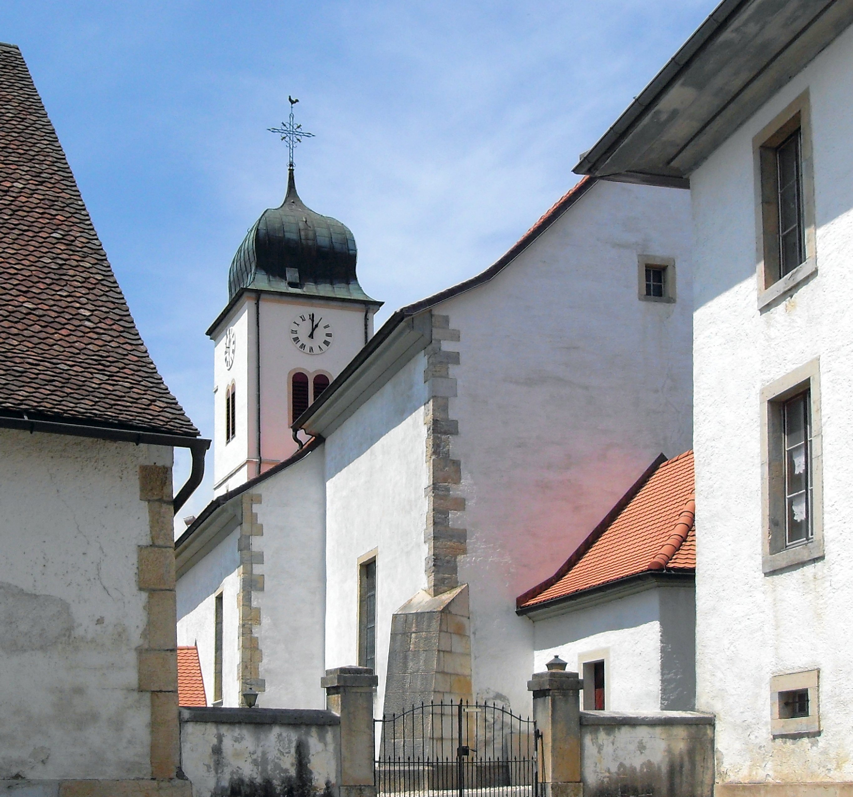 L'église Saint-Sébastien à Bourrignon, Suisse